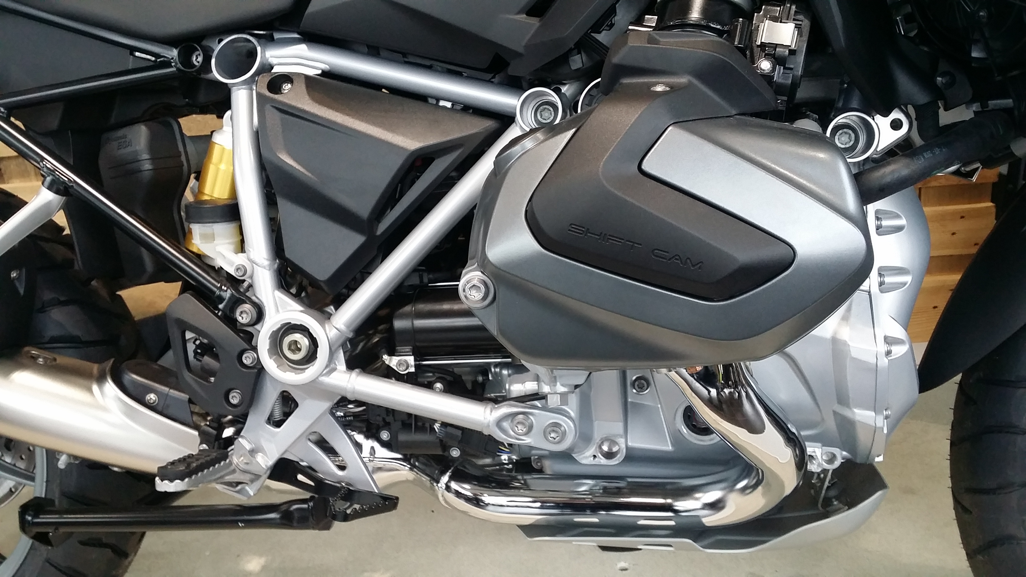 BMW R1250GS Modell 2018 Motorblock Rechte Seite Zylinderkopf mit ShiftCam